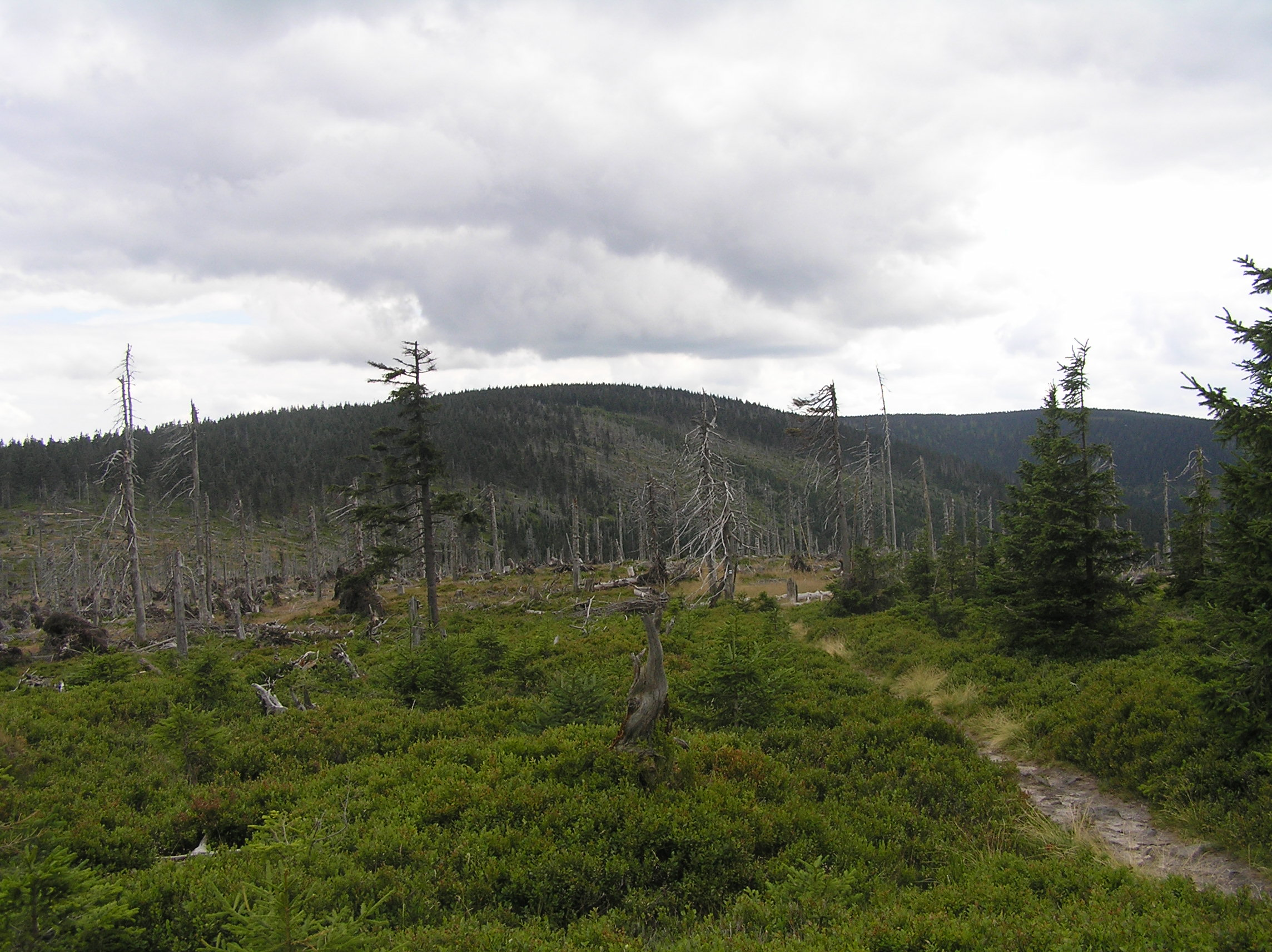 Černá Kupa (1295 m) is the mountain near the the town Králíky, the Králický Sněžník Mountains, Czech Republic